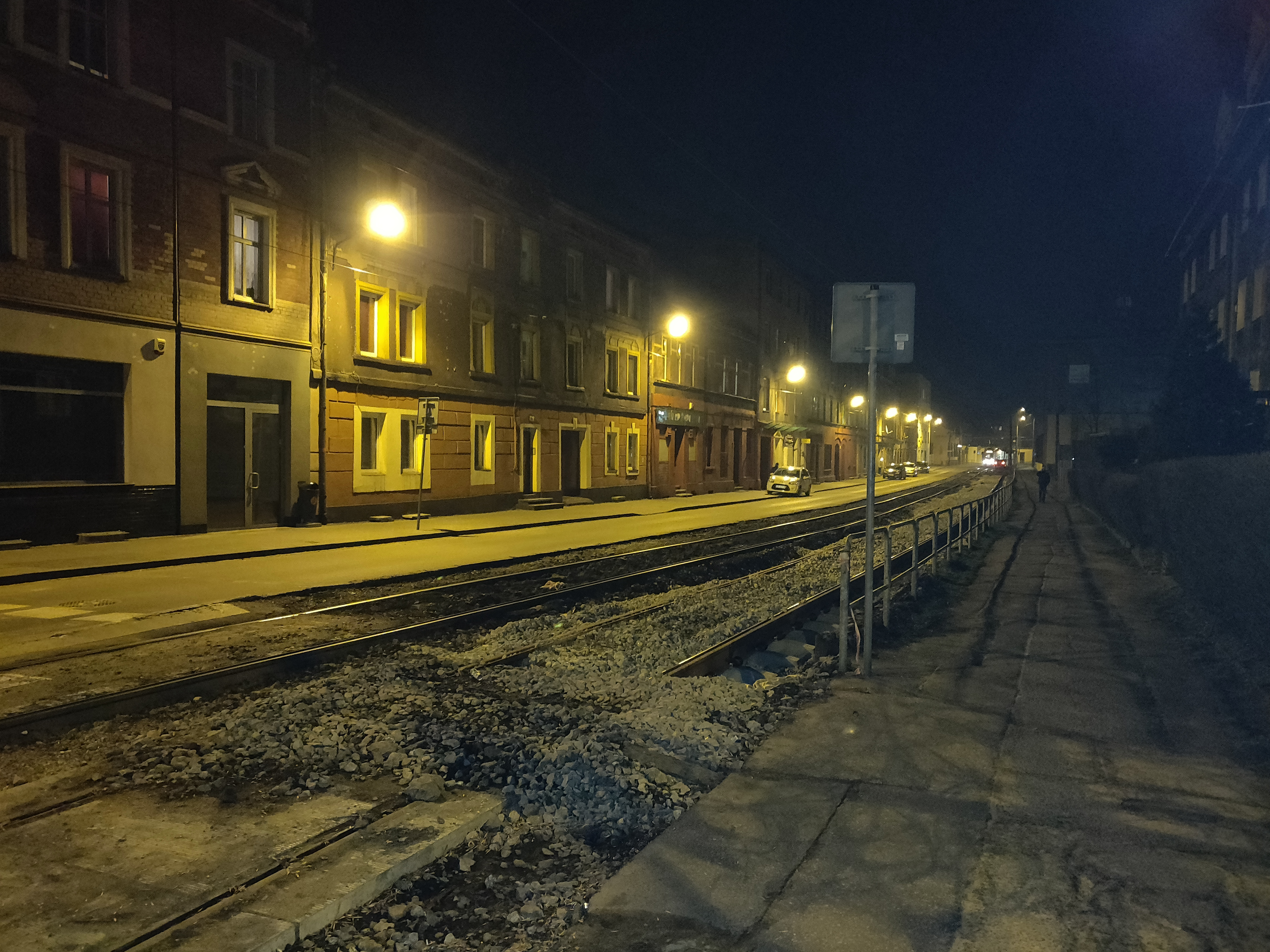 Katowice - ul. Obrońców Westerplatte